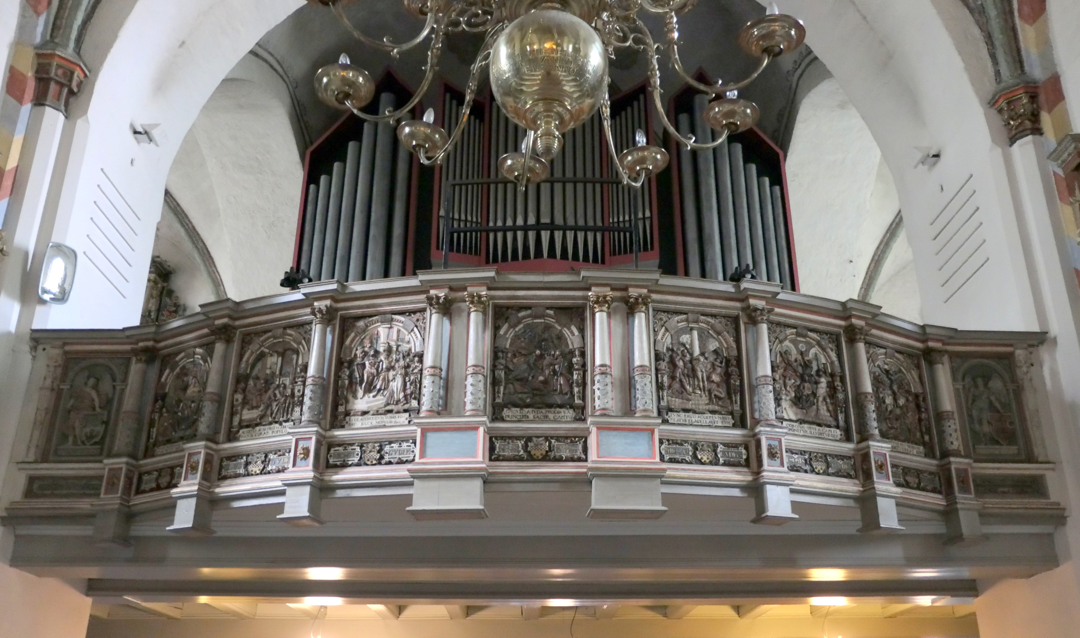 Orgel der Marienkirche Rendsburg, Kreis Rendsburg-Eckernförde, Schleswig-Holstein, Deutschland